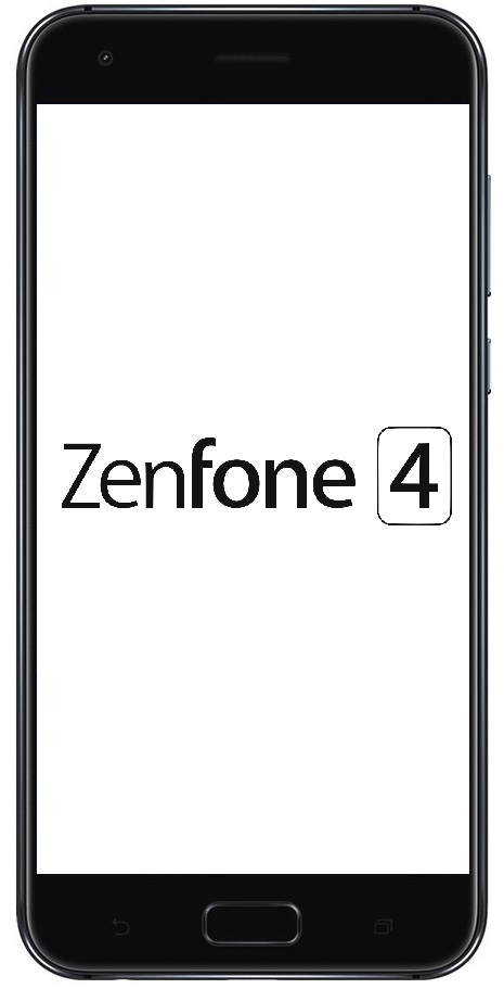 華碩於2017年發布之型號